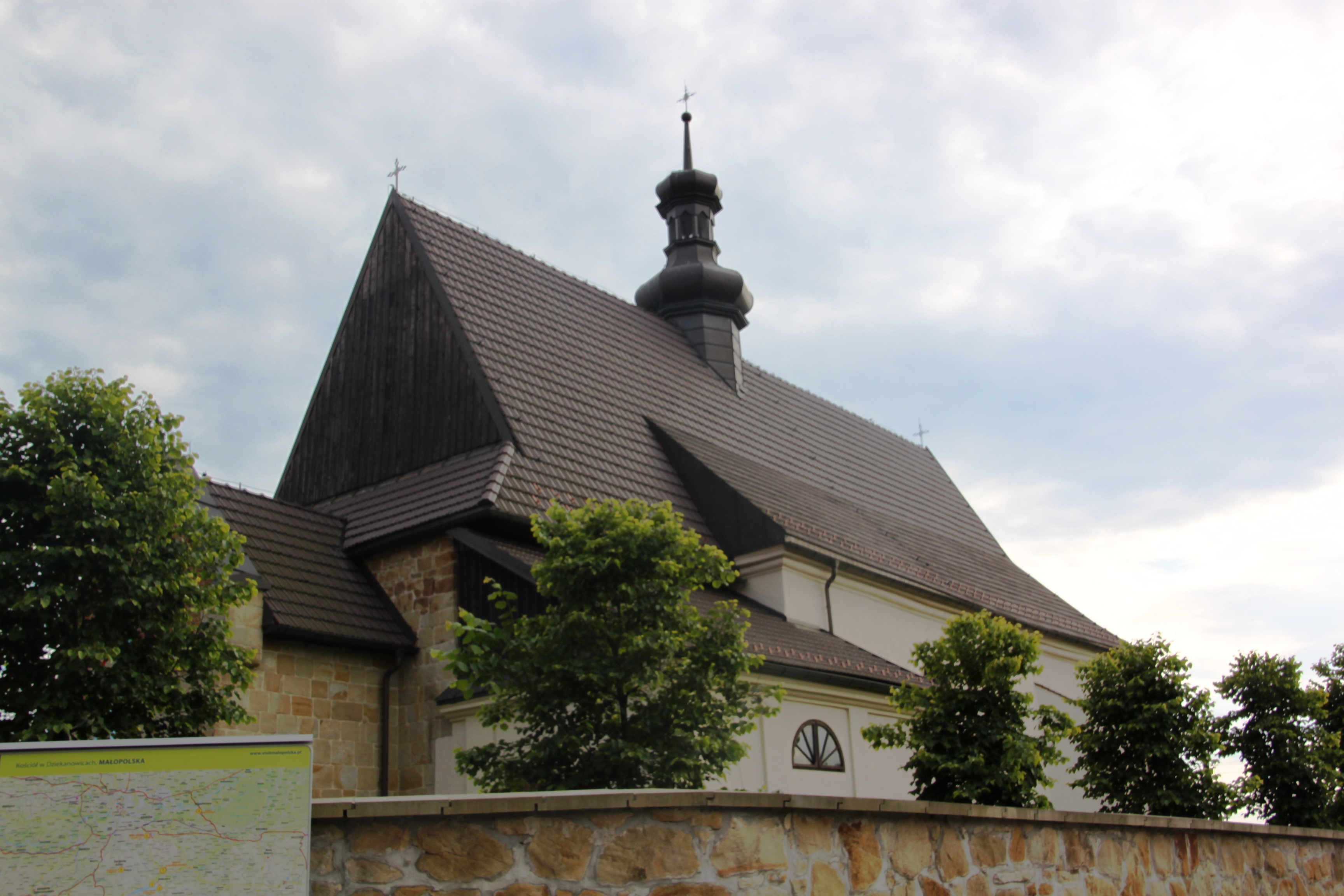 Dziekanowice, zespół kościoła par. p.w. św. Marii Magdaleny, 1226, 1645